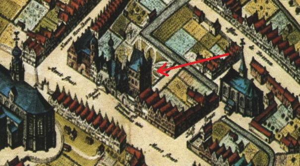 Uitsnede van de Gruytemastins